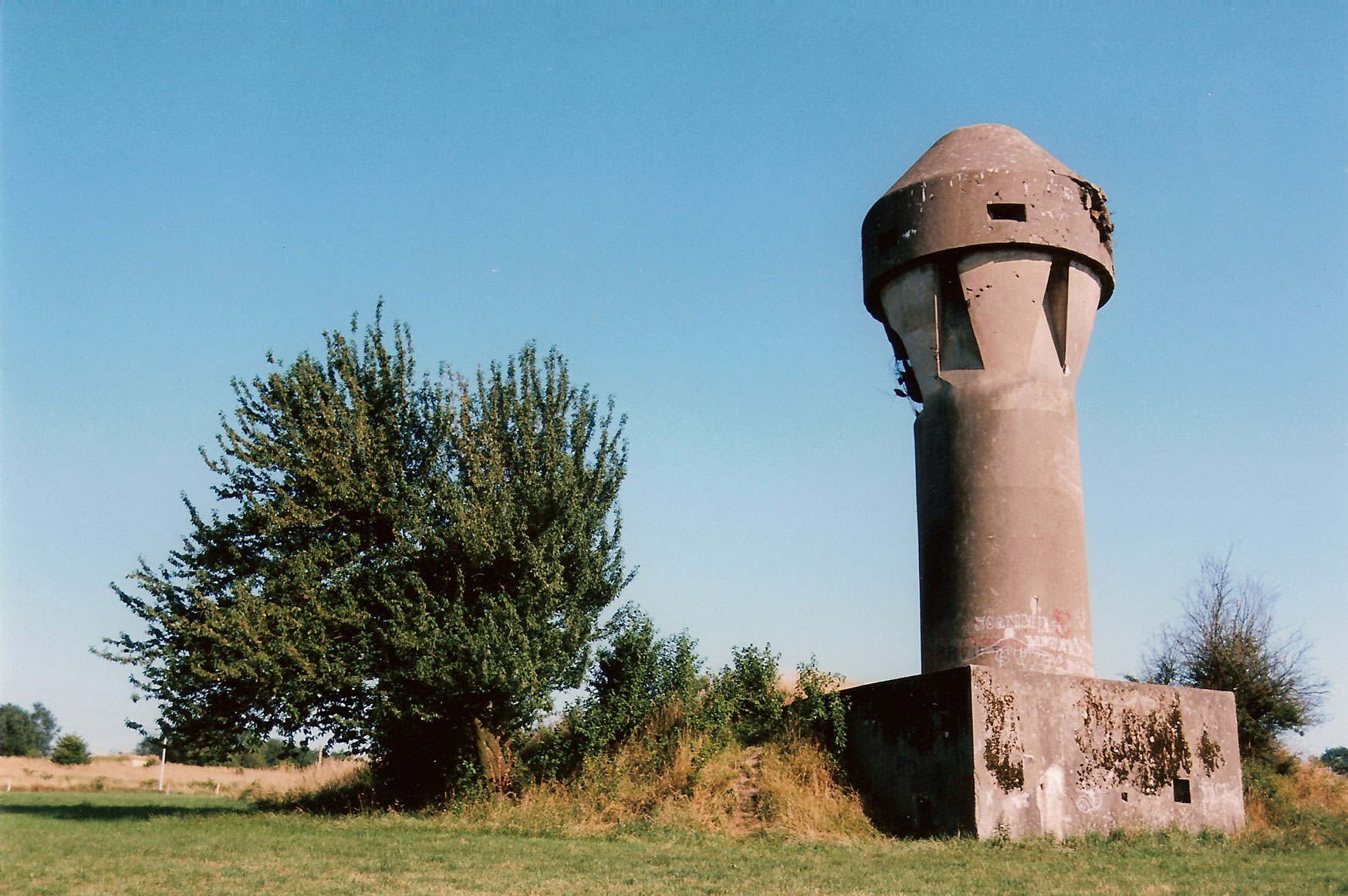 Tour d'aération du fort de Boncelles, un des éléments de la Position fortifiée de Liège (Belgique). Au pied de la tour : un bunker destiné à défendre la prise d'air. Etat en 1994. La friche de la tour d'aération est une friche à fromental (Arrhenartherum elacius), installée sur le socle en béton de la tour et sur les terrains remaniés environnants (± 1250 m²). En 1995, dix-huit espèces de spermatophytes (plantes à fleurs) y ont été recensées. Le site présente un certain nombre d'espèces caractéristiques des milieux rudéralisés telles que la chélidoine (Chelidonium majus), la mauve musquée (Malva moschata), le millepertuis commun (Hypericum perforatum), la matricaire inodore (Matricaria maritima subsp. inodora), l'ortie (Urtica dioica), ... Quelques mousses croissent sur le socle en béton exposé à l'W (Tortula muralis, Orthotrichum anomalum, Bryum argenteum, Didymodon sp.), ainsi que quelques lierres (Hedera helix). Recensements réalisés par Philippe Martiny. Dans le bunker, des papillons comme le paon du jour(Inachis io), hivernent à l'état adulte.